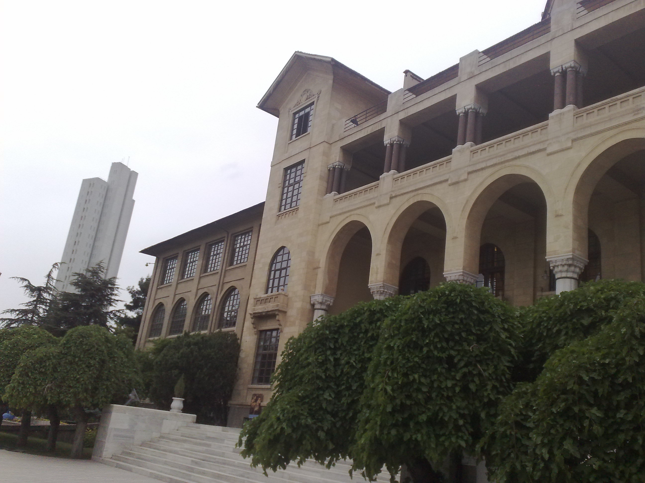 Gazi Üniversitesi'nden bir görüntü.